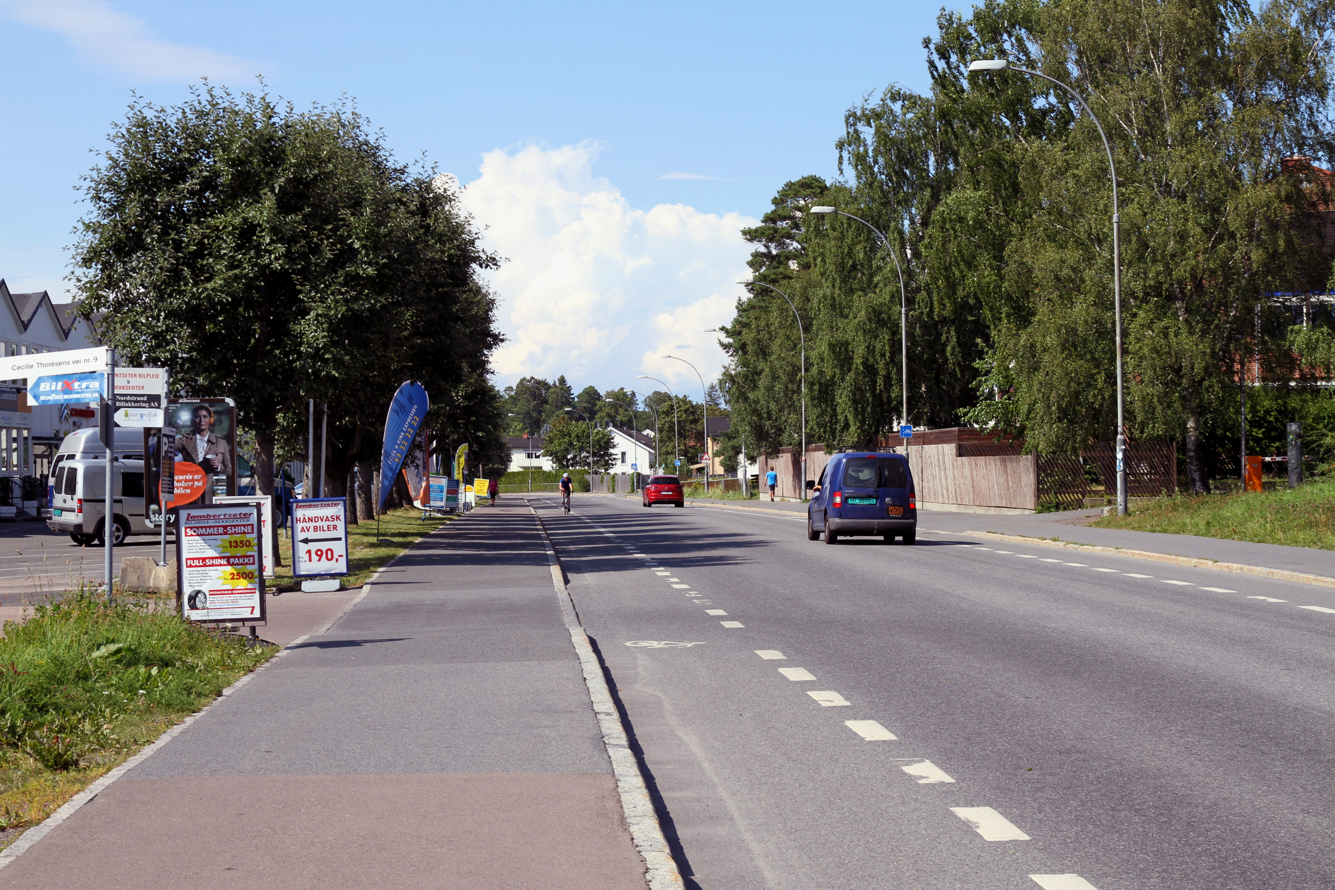 Cecilie Thoresens vei i Oslo.